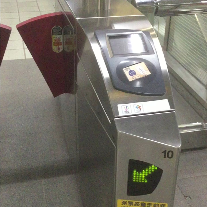 台北捷運南港車站10號驗票閘門進站驗票區（可使用悠遊卡與一卡通）